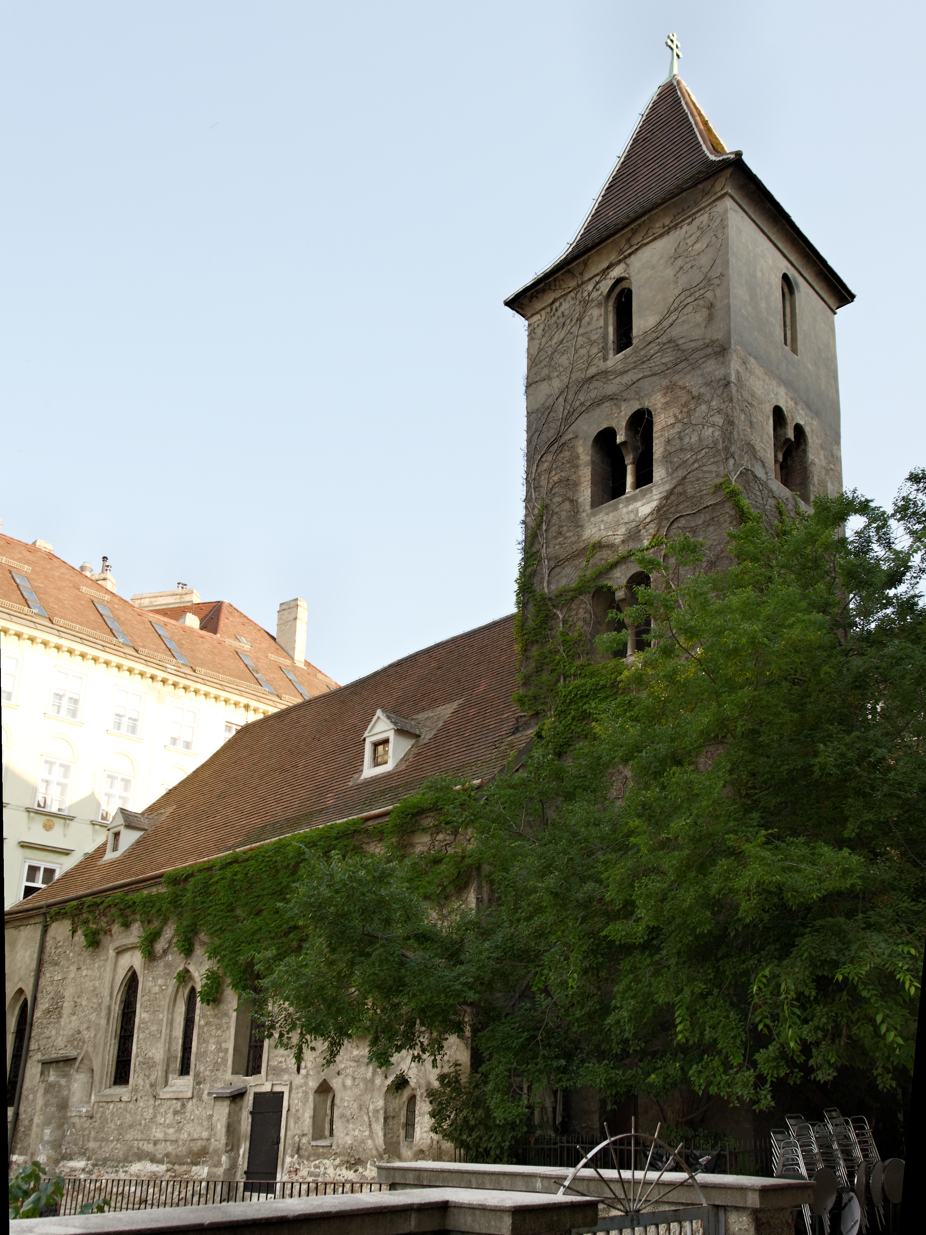 Église Saint-Rupert, Vienne (Autriche). Bâtie au XIe siècle sur le site d'une chapelle fondée en 740, elle n'a conservé de sa période romane que sa nef et le bas du clocher